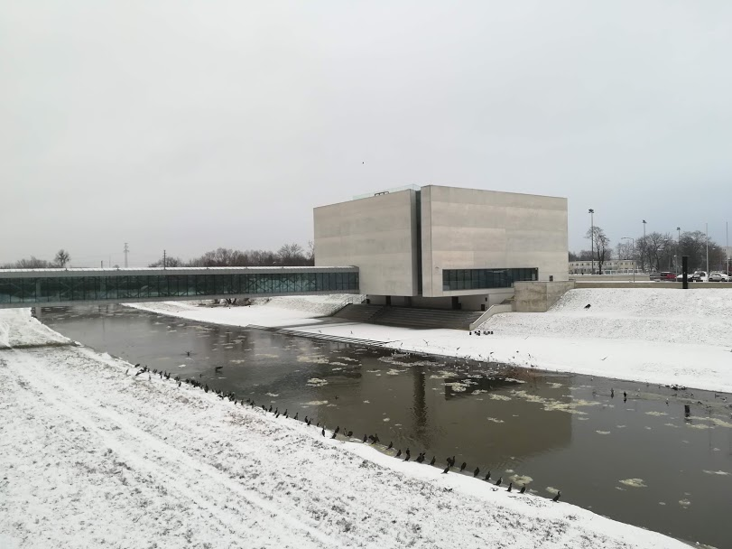 Ворота Познани